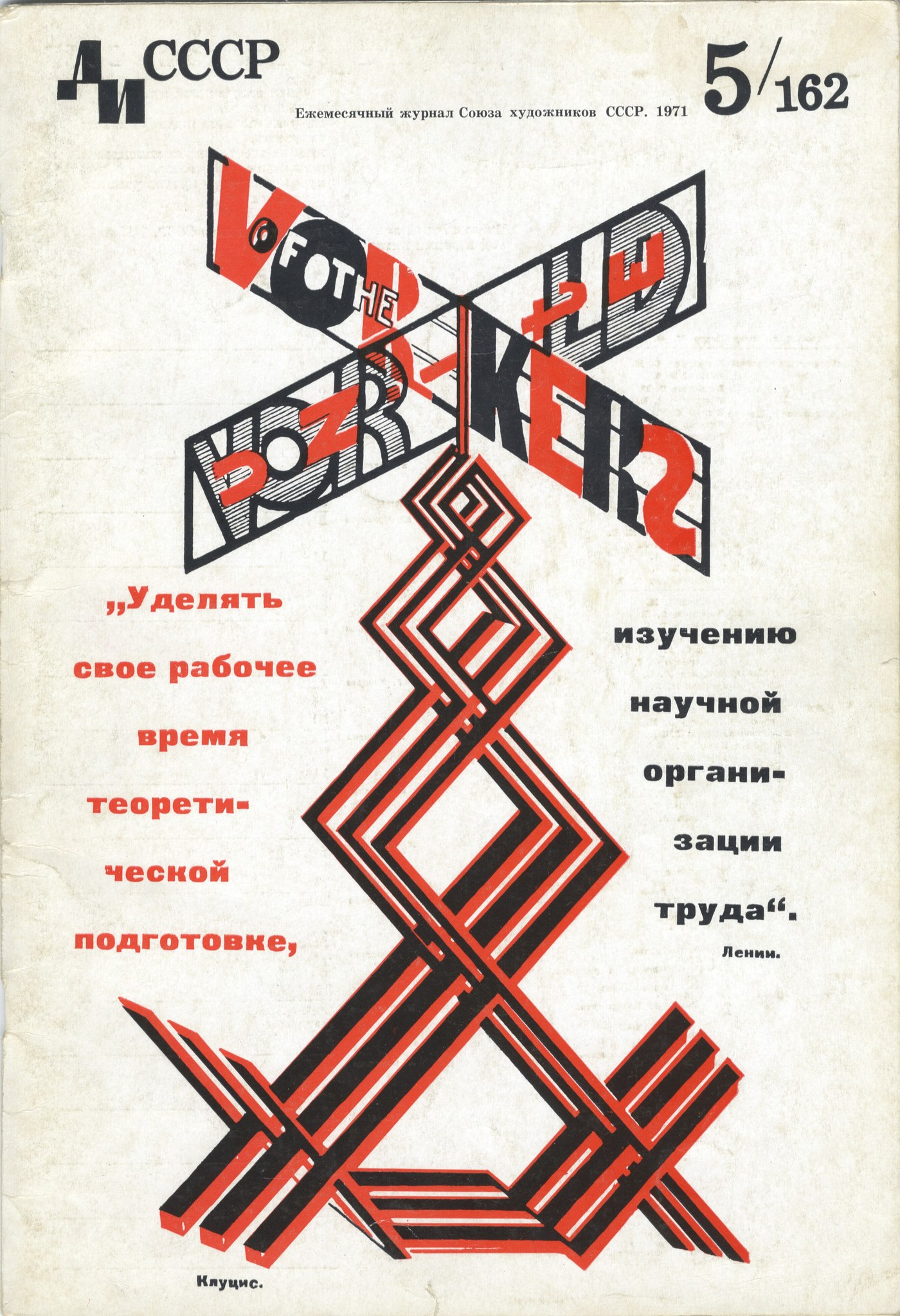 Обложка журнала "Декоративное искусство СССР". Вып. 162. 1971.